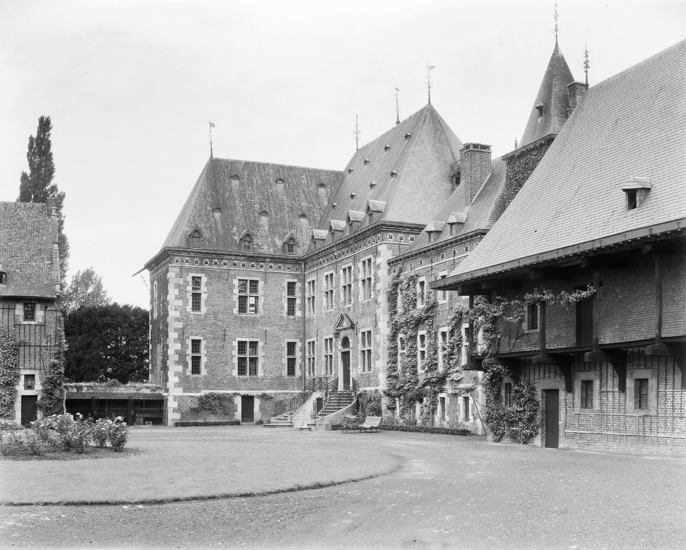 Sint Pietersvoeren, Kasteel